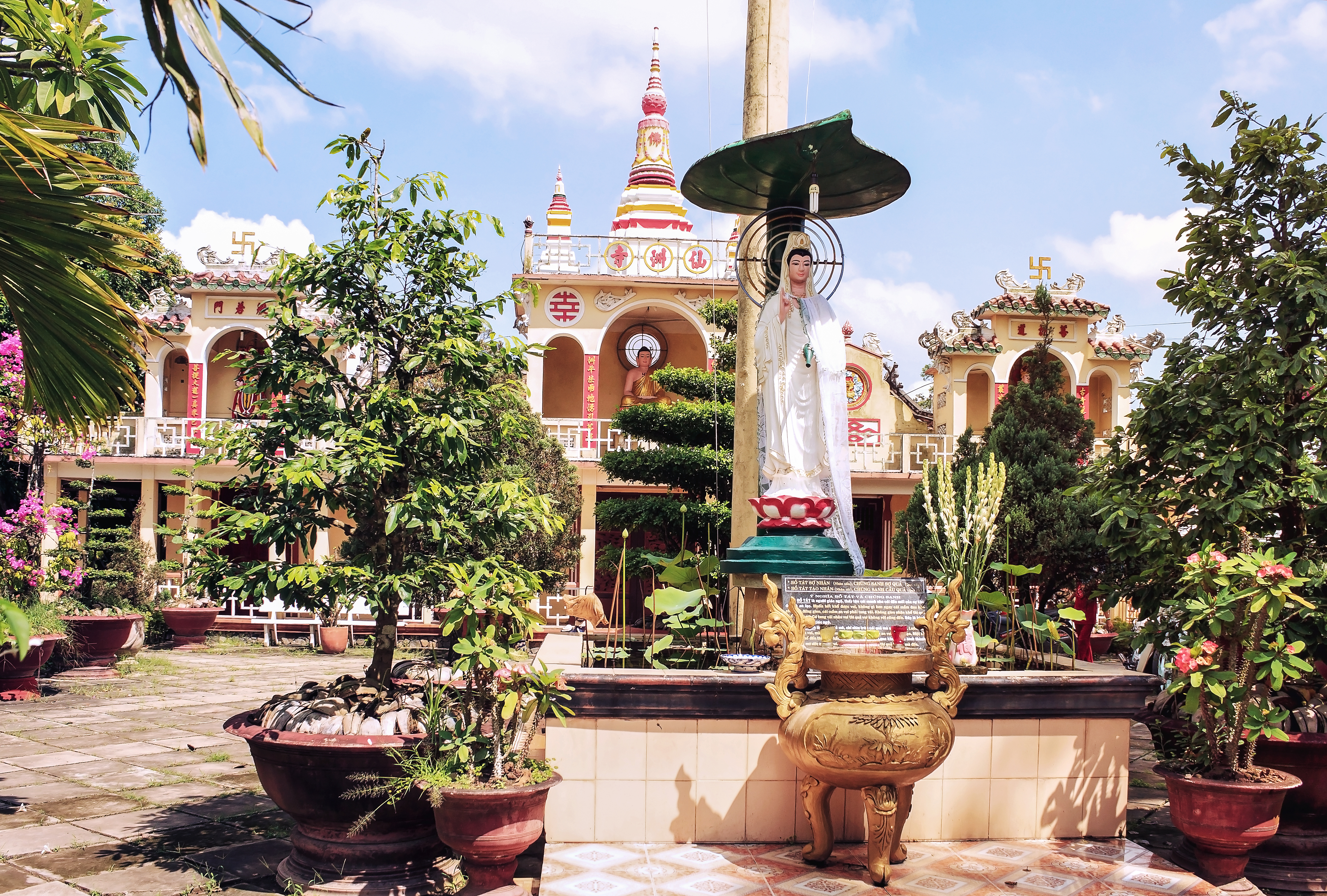 Chùa Tiên Châu ở cù lao An Bình, thuộc huyện Long Hồ, tỉnh Vĩnh Long (Việt Nam).